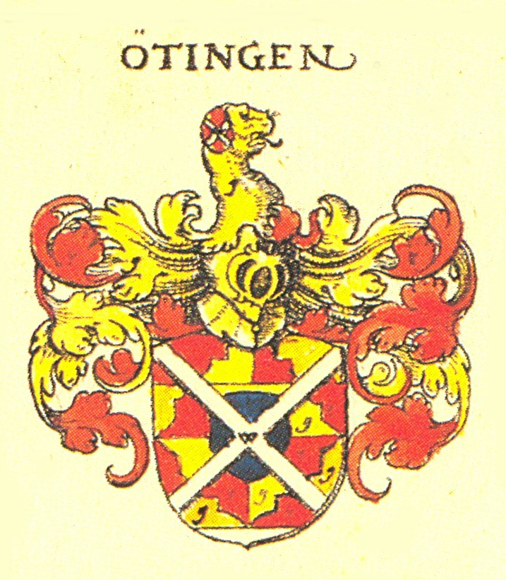 Johann Siebmacher: New Wappenbuch Wappen der Grafen von Öttingen